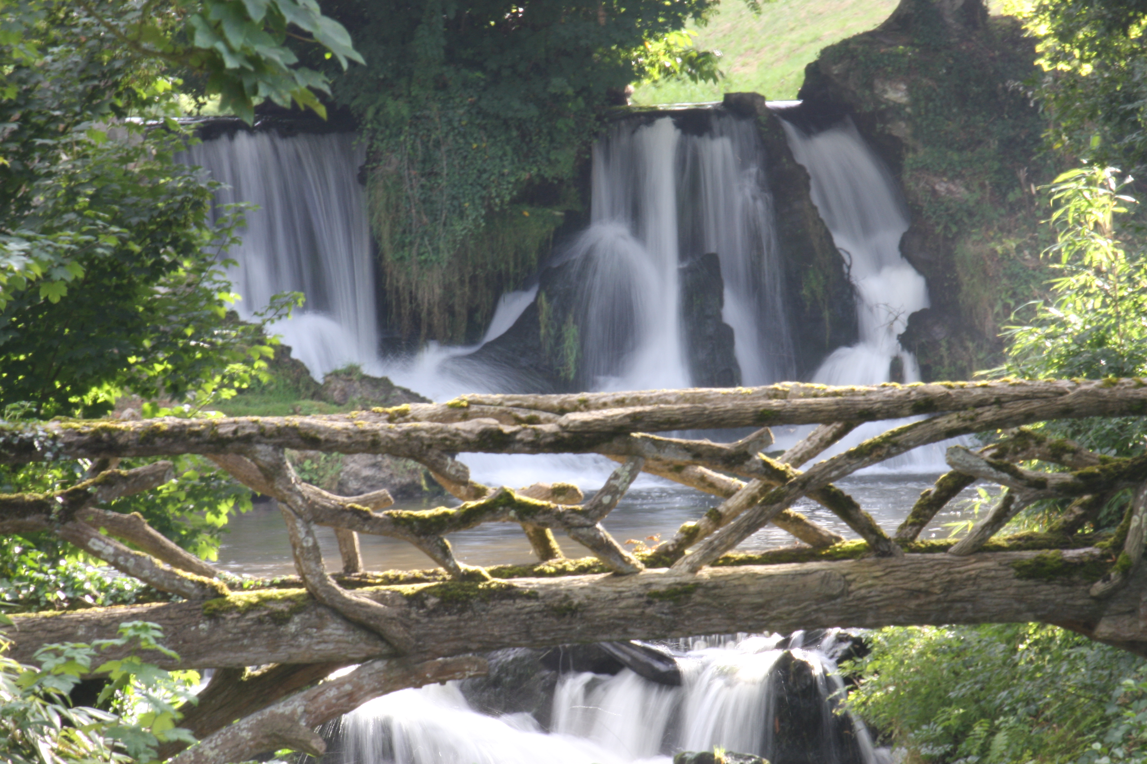 la célebre cascade du Vast à la rivière de la Saire